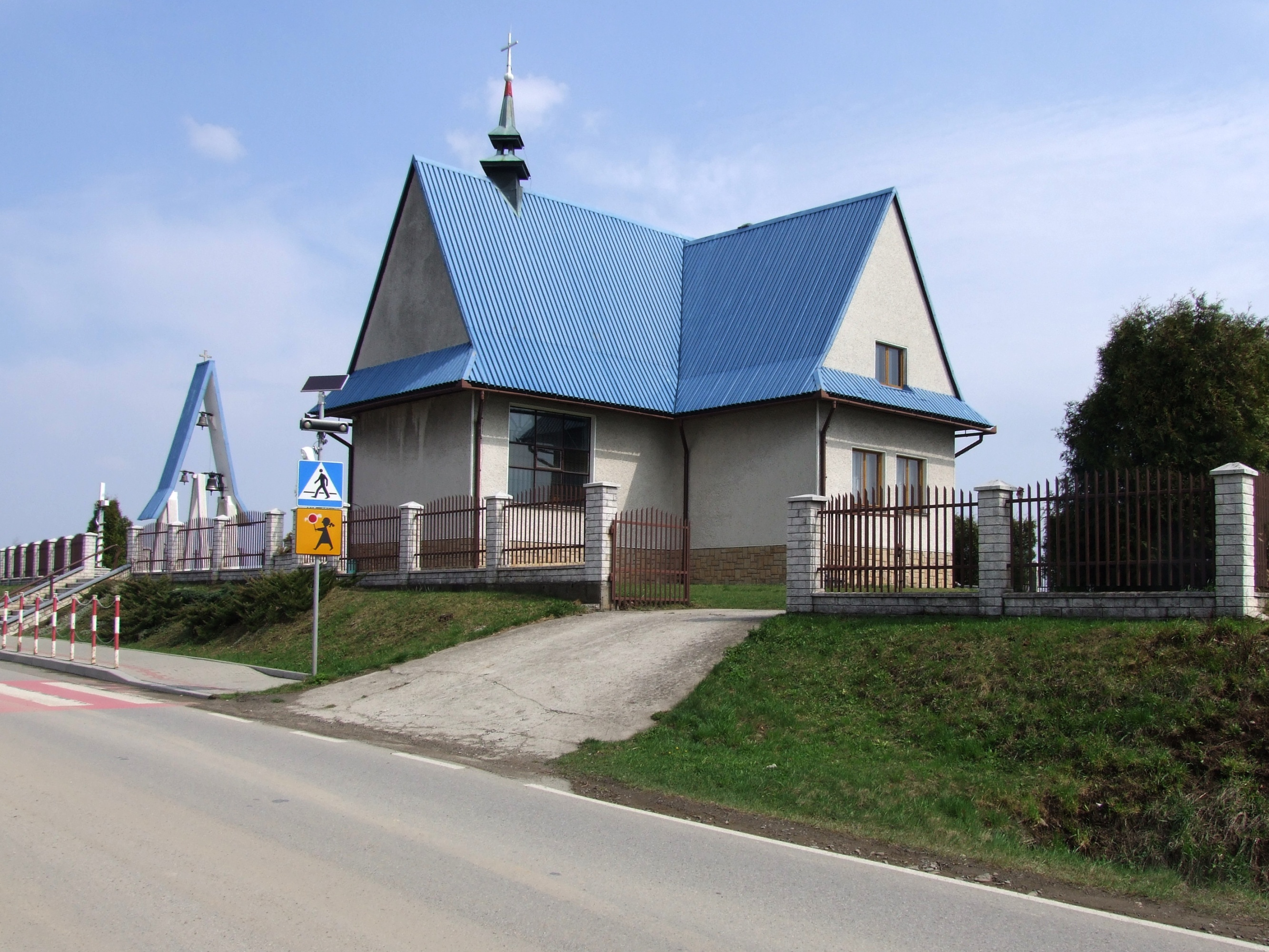 Stare Rybie. Kościół